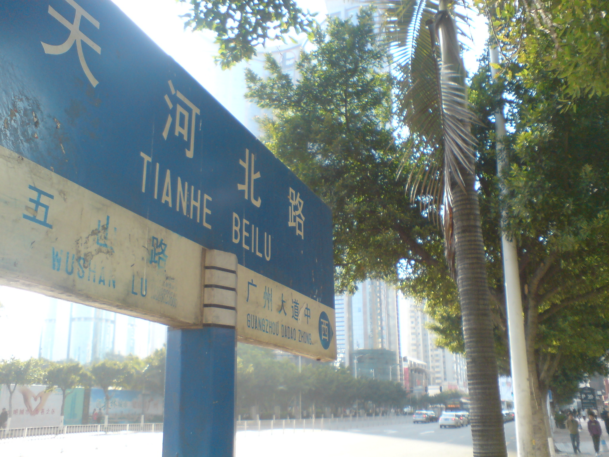 天河北路路牌